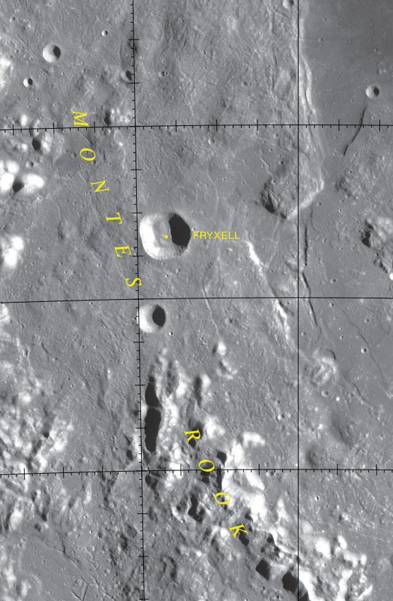 Cráter lunar Fryxell. (Imagen LRO)